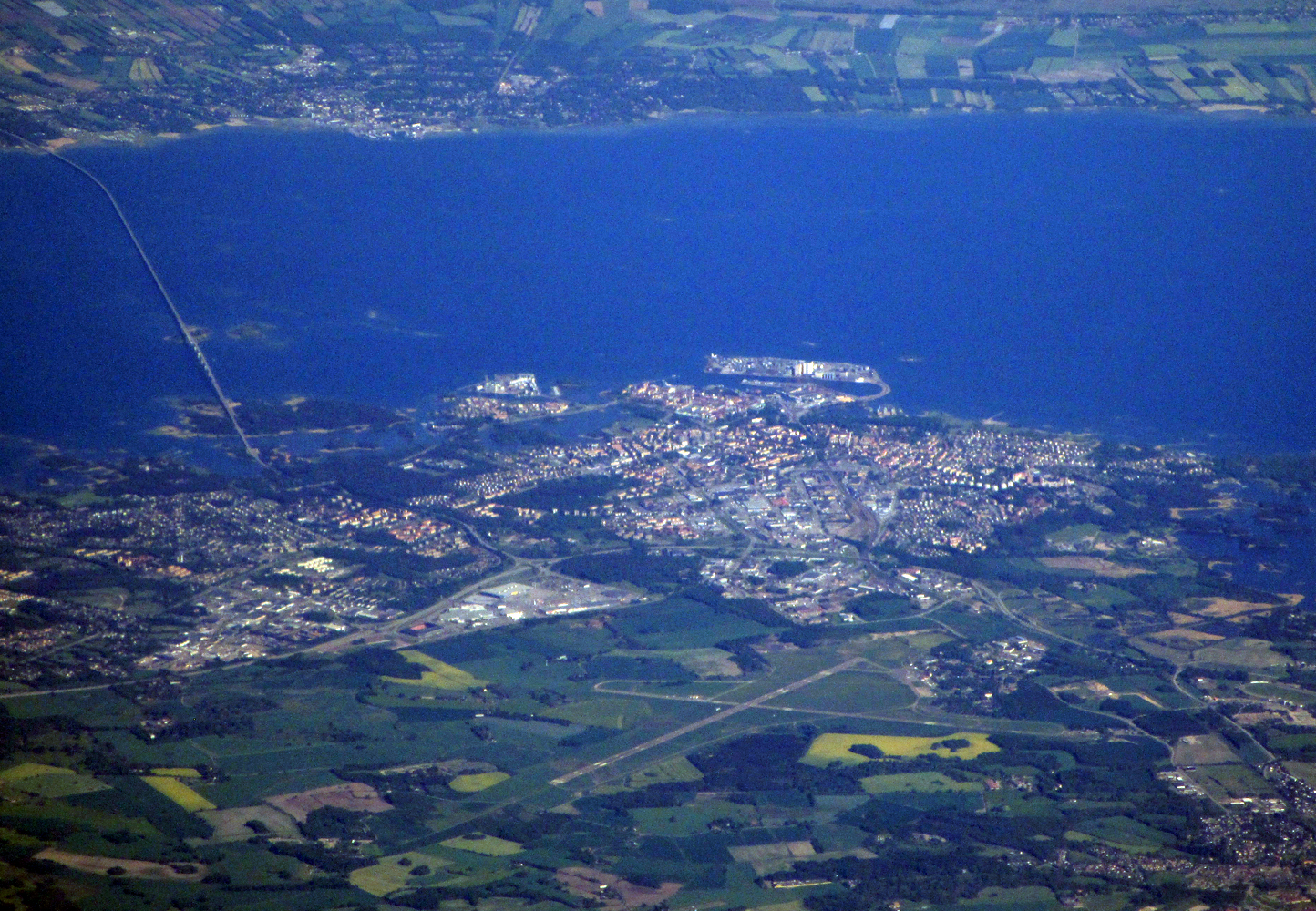 Stadt Kalmar am Kalmarsund (Schweden)